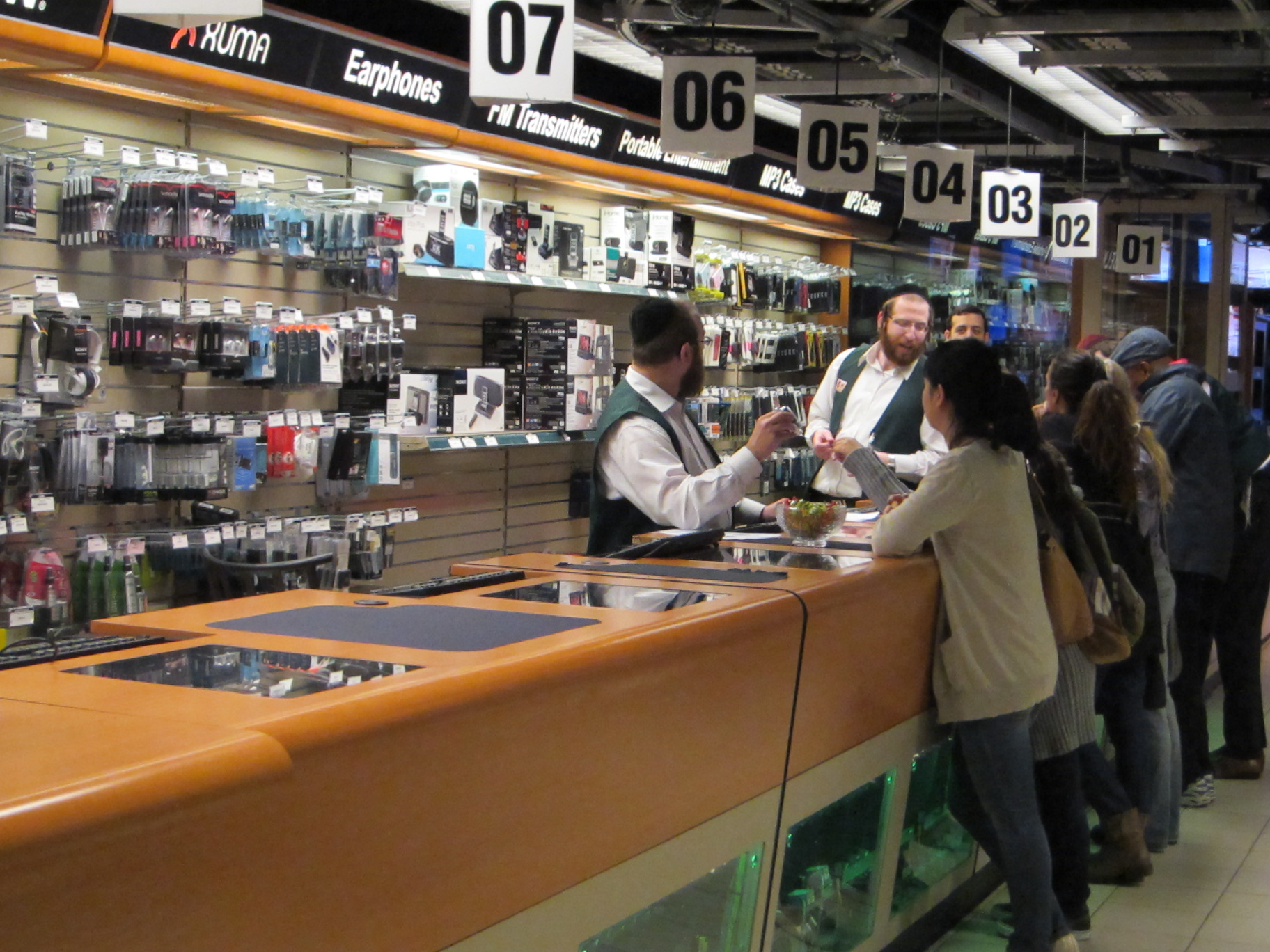 חברת צילום - B&H תמונות ווידאו. מנהטן. ניו יורק